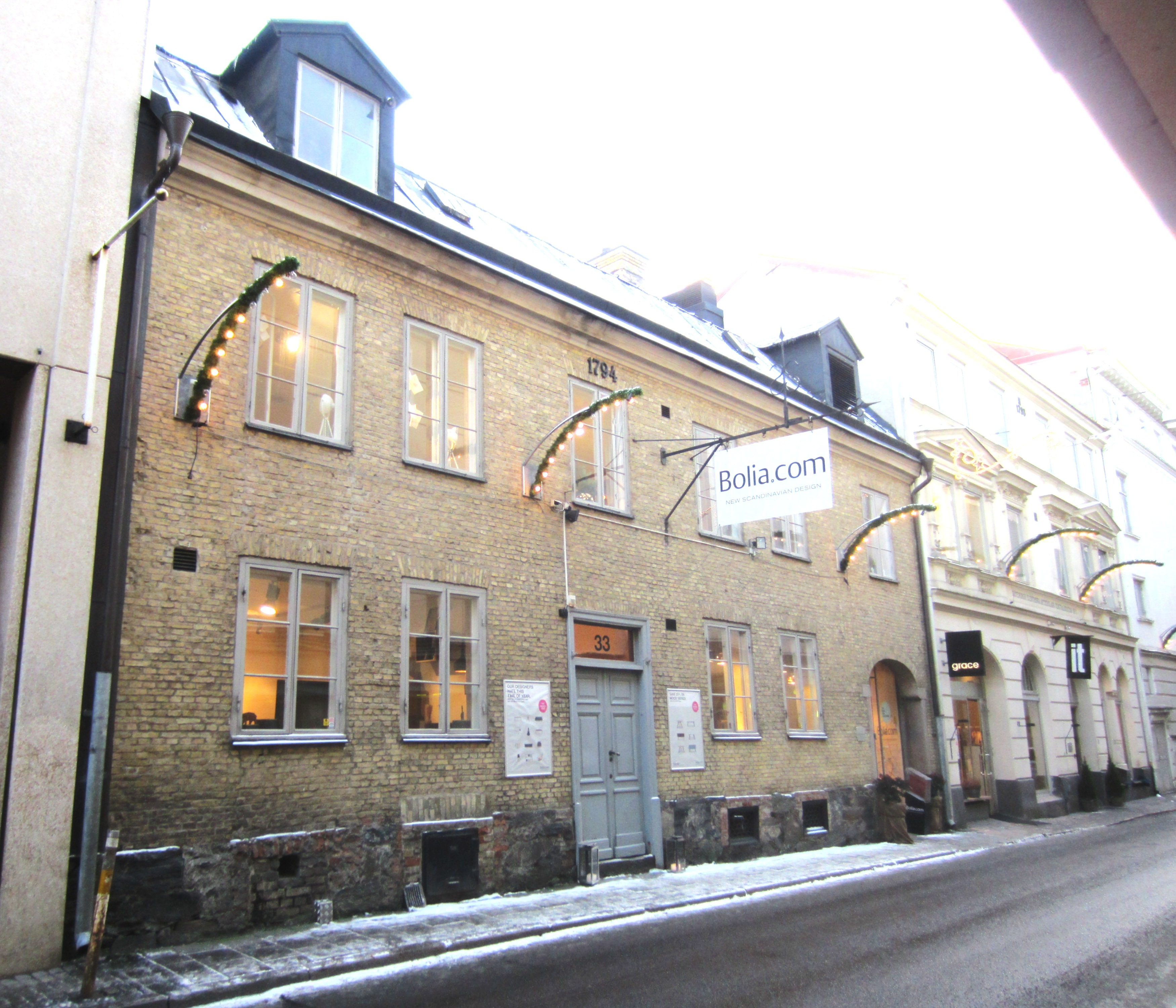 Huset på Kyrkogatan 33 i Göteborg ritades av stadsarkitekten Carl Wilhelm Carlberg och uppfördes 1794–1798.